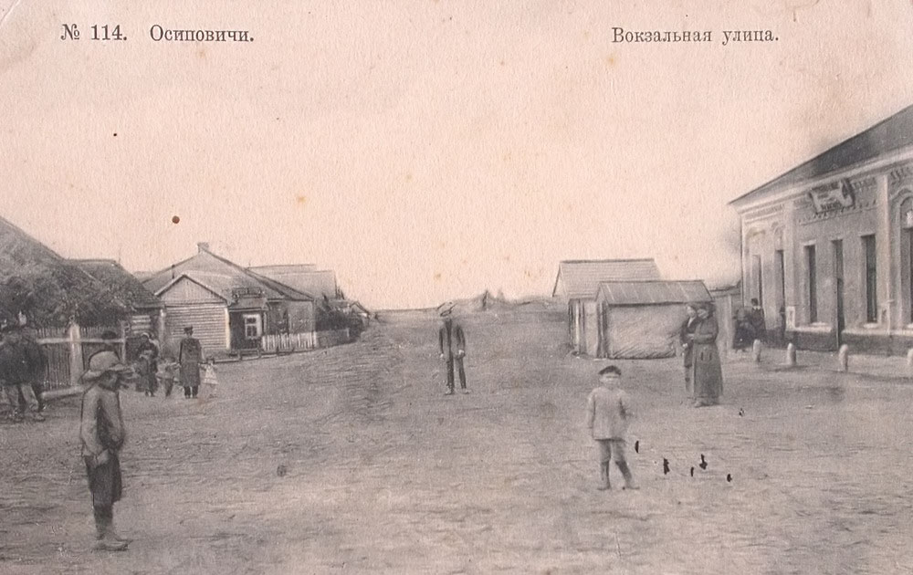 Беларуская (тарашкевіца): Асіпавічы (Asipavičy), вуліца Вакзальная